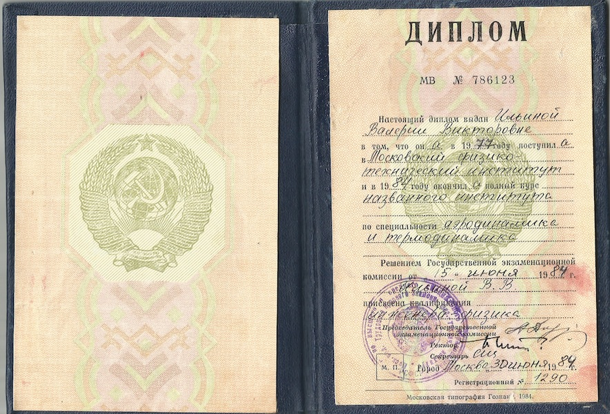 Скан диплома о высшем образовании